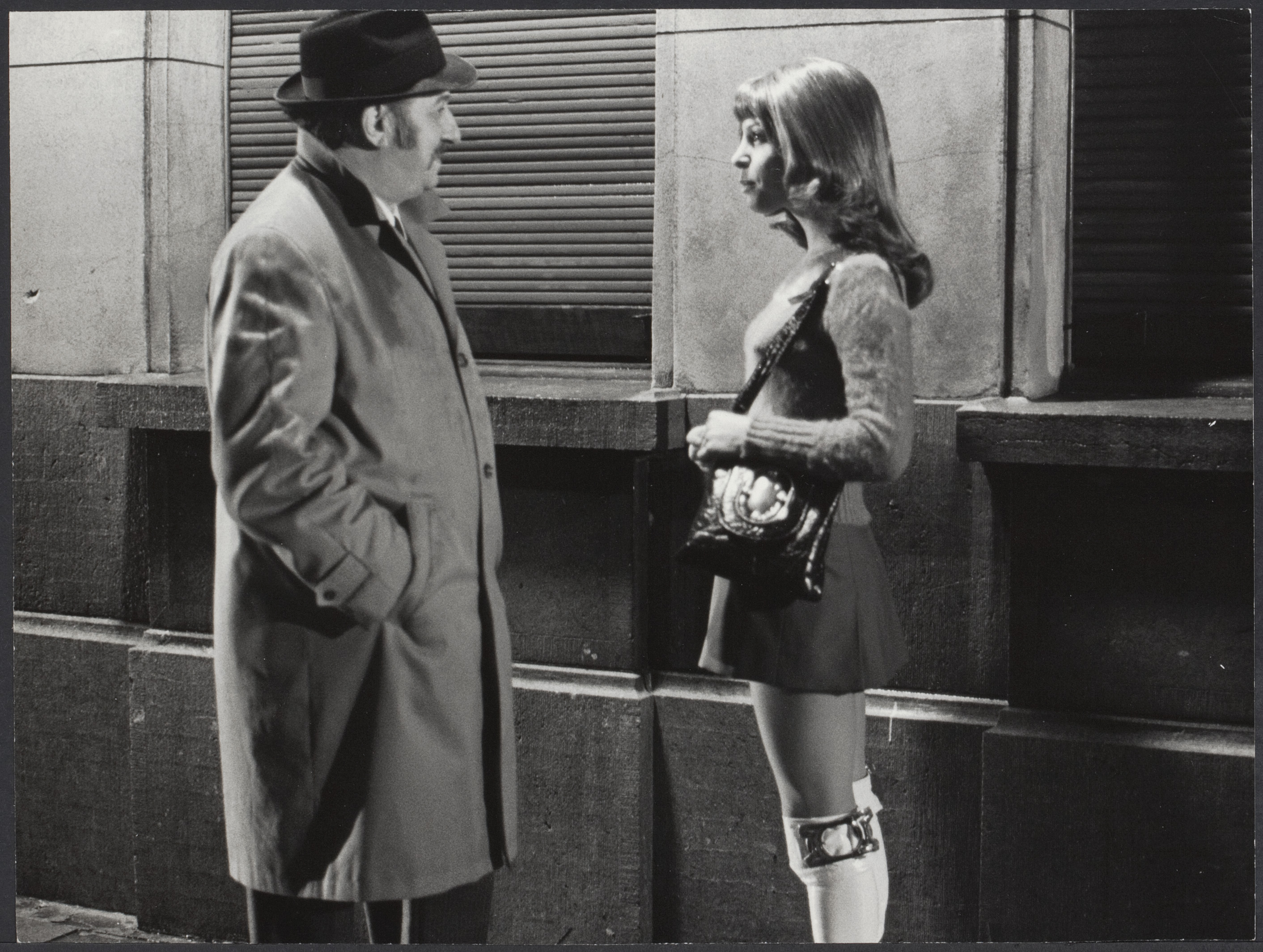 Foto van Frans Laarmans